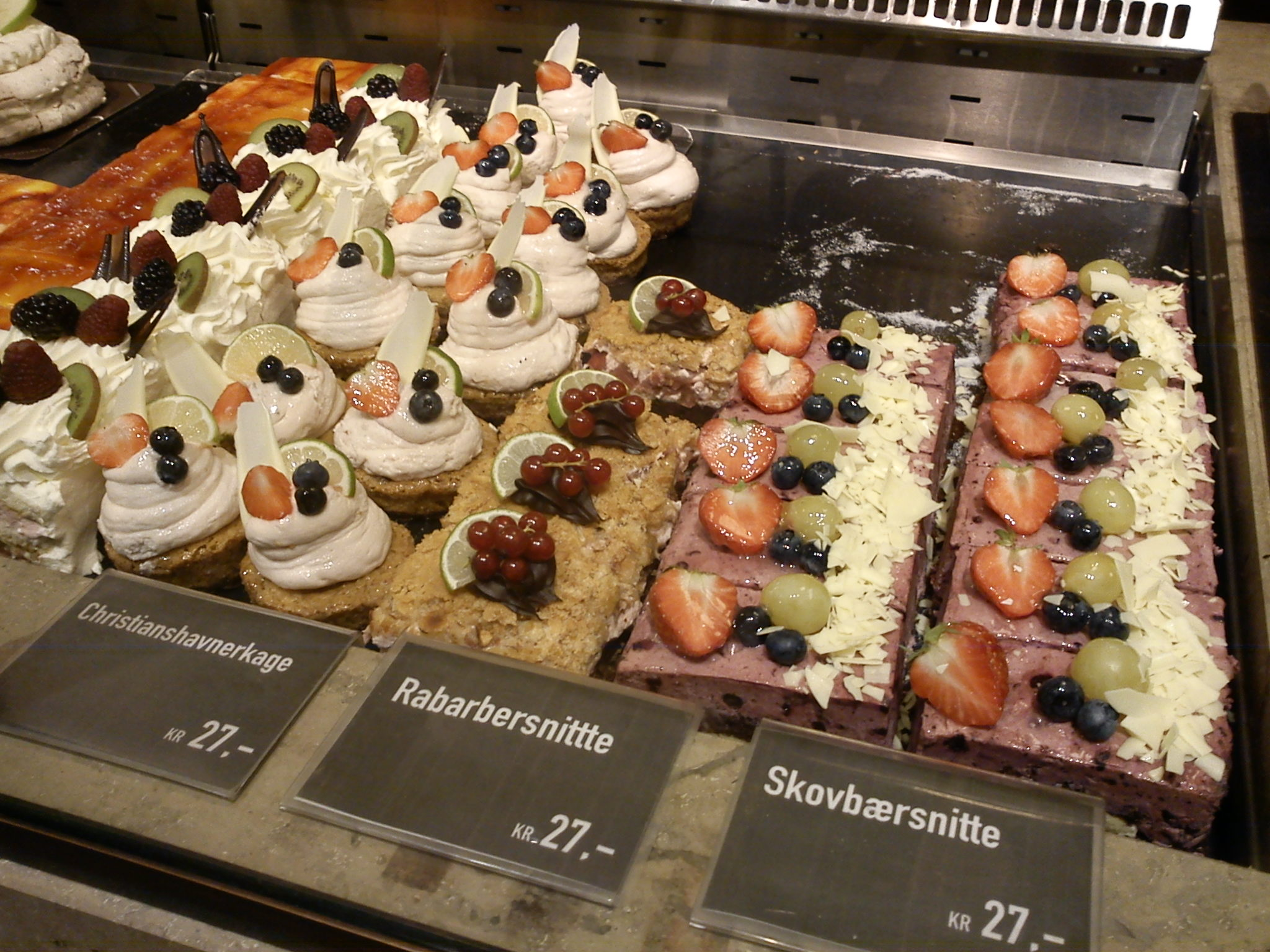 Flødekager hos Lagkagehuset i Jægergårdsgade, Aarhus.